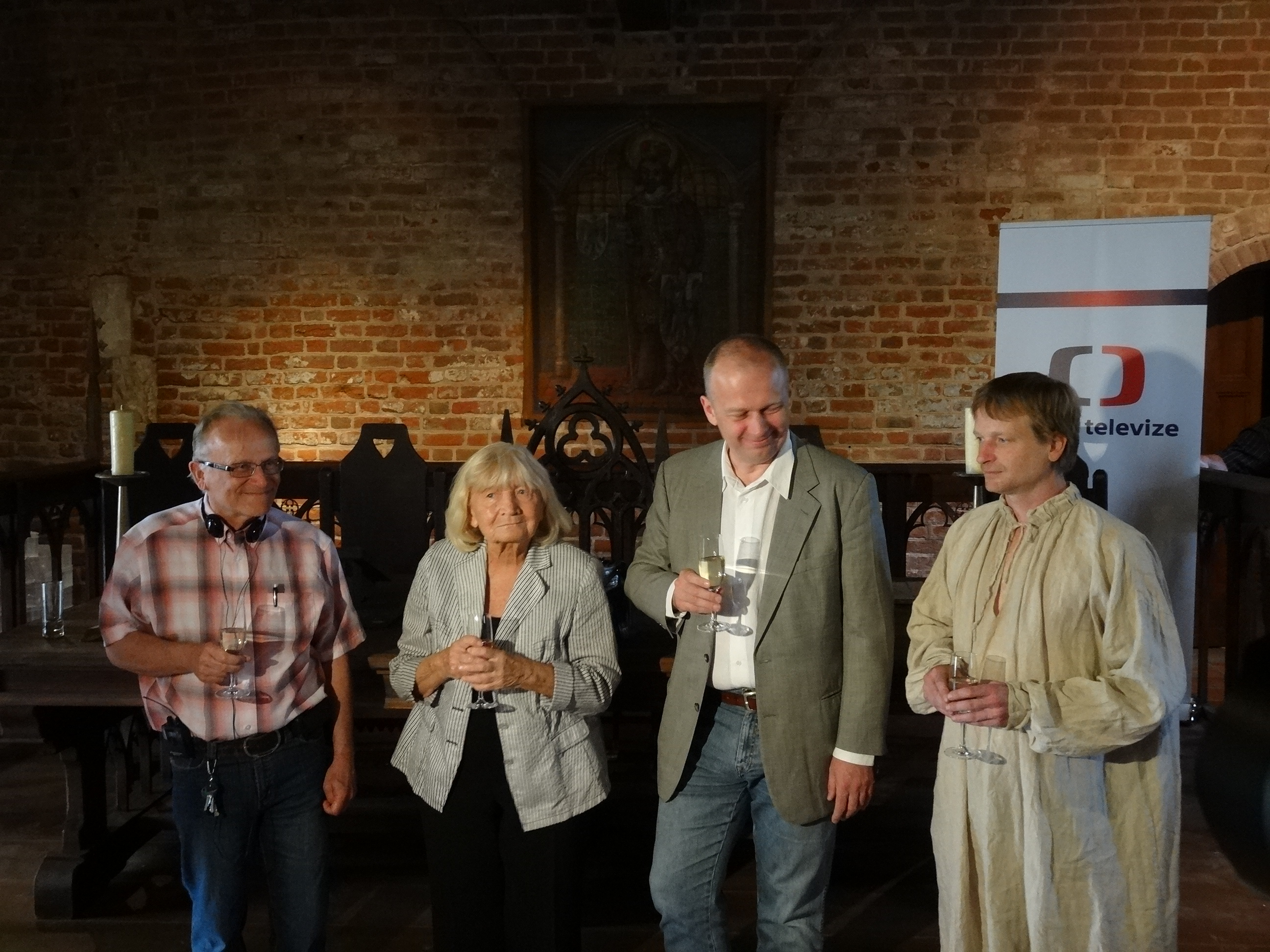 První klapka filmu Jan Hus - Autor: Karolína Černá a Emma Orphe pro & 10Mpix.cz